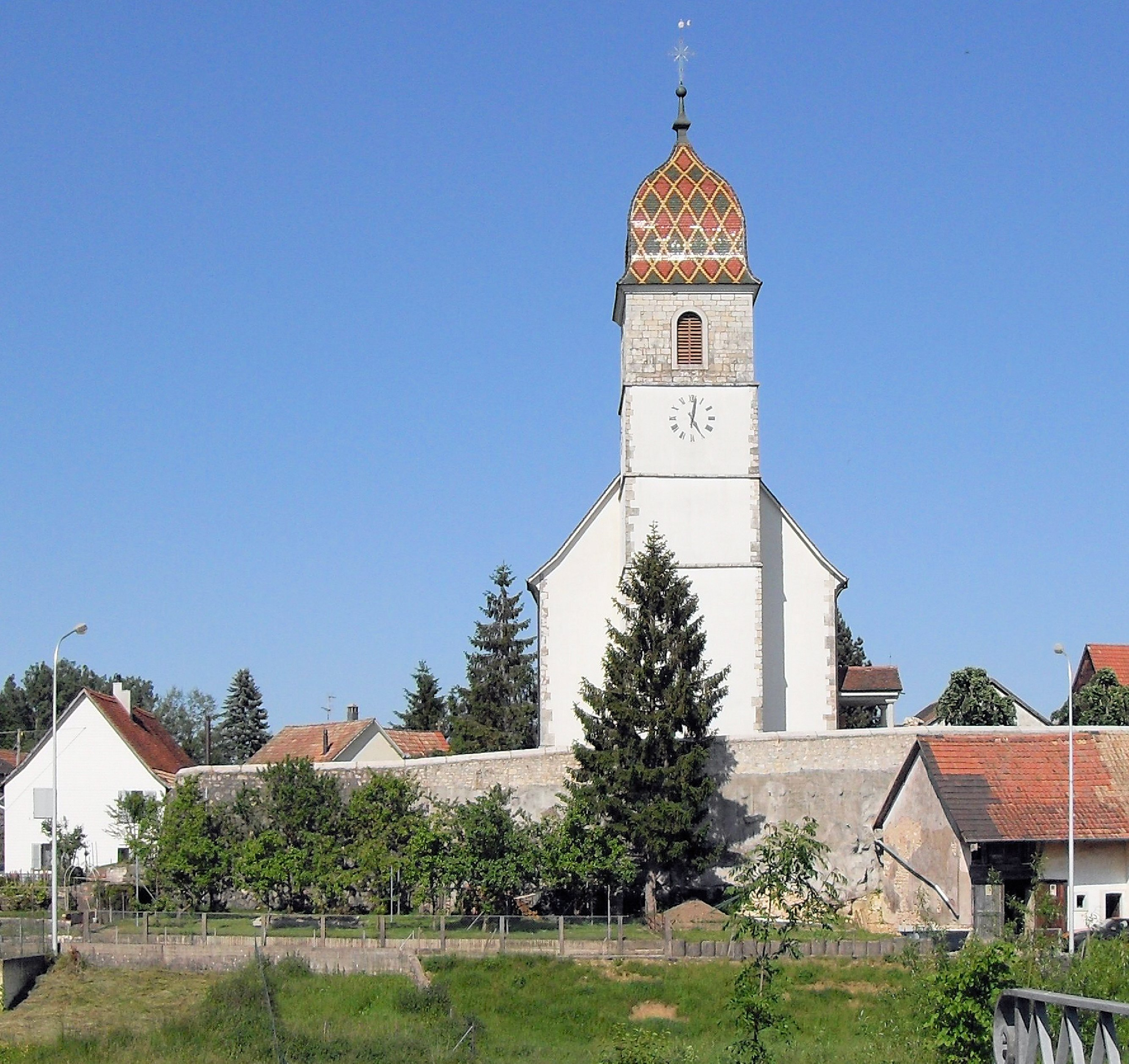 L'église Saint-Laurent à Bonfol, Suisse